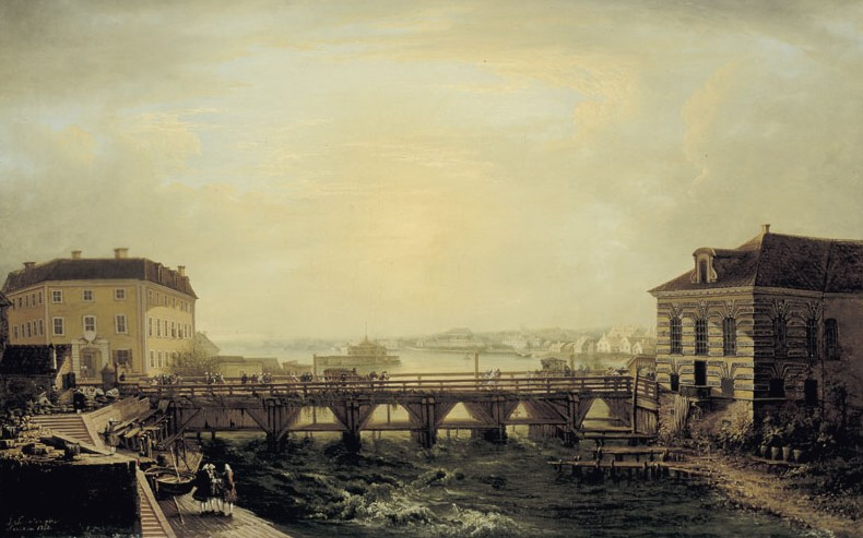 Utsikt från Lejonbacken över södra Norrström med gamla Norrbro, Kungl. Myntet och Kungl. Stallet